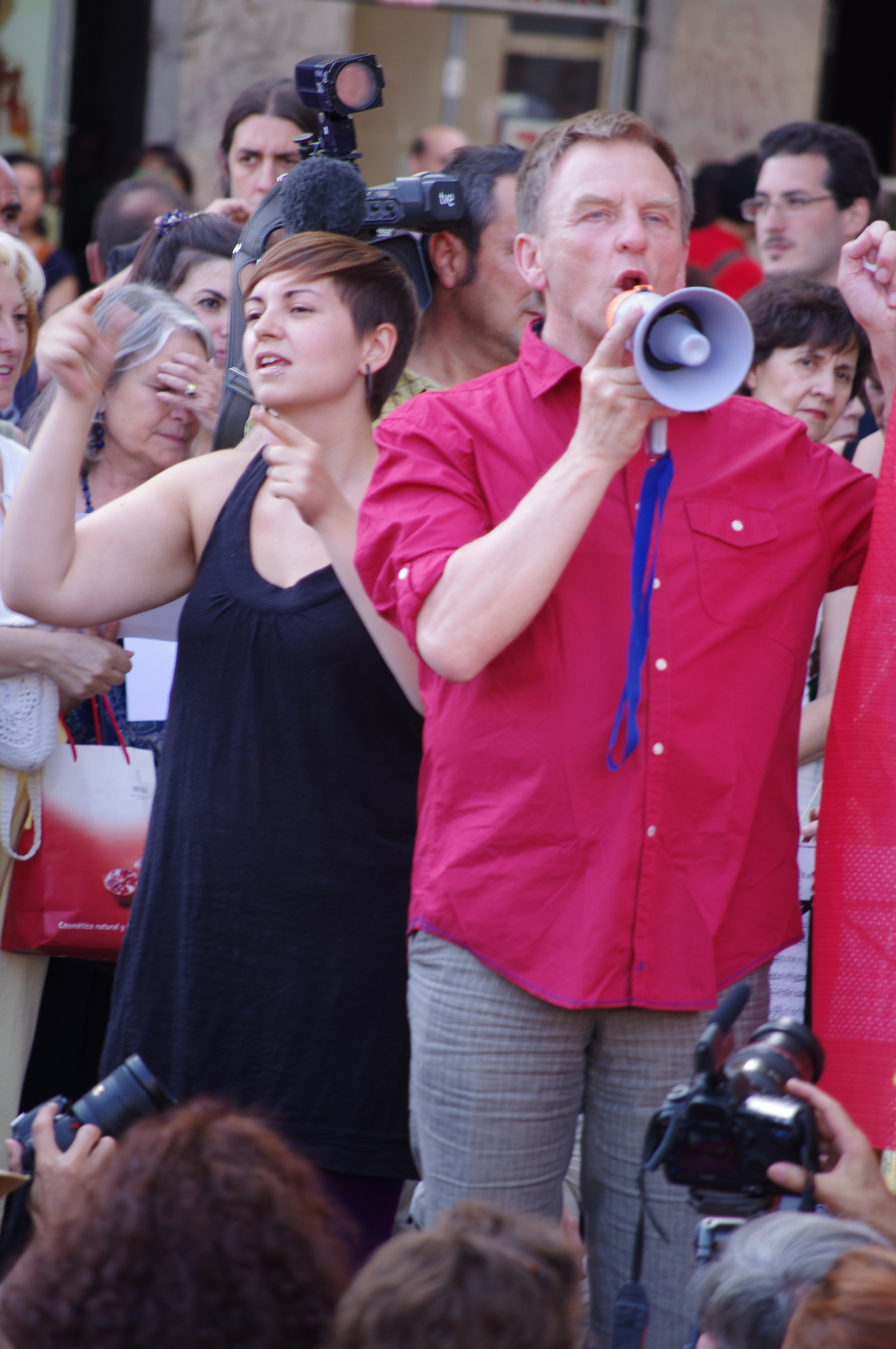 Hördur Torfason pasó por Sol, exponiendo sus ideas y mostrando su apoyo al movimiento 15M